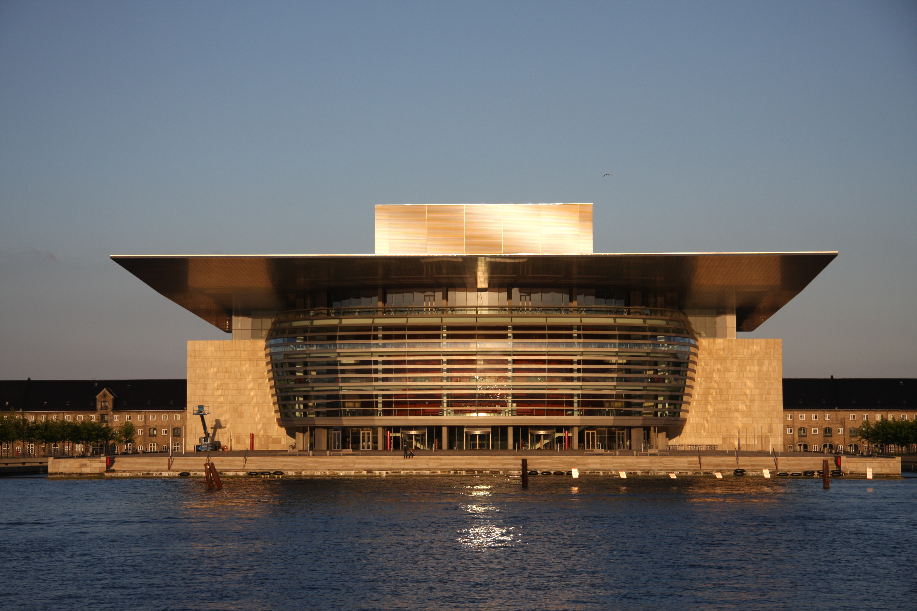 Copenhagen Opera House